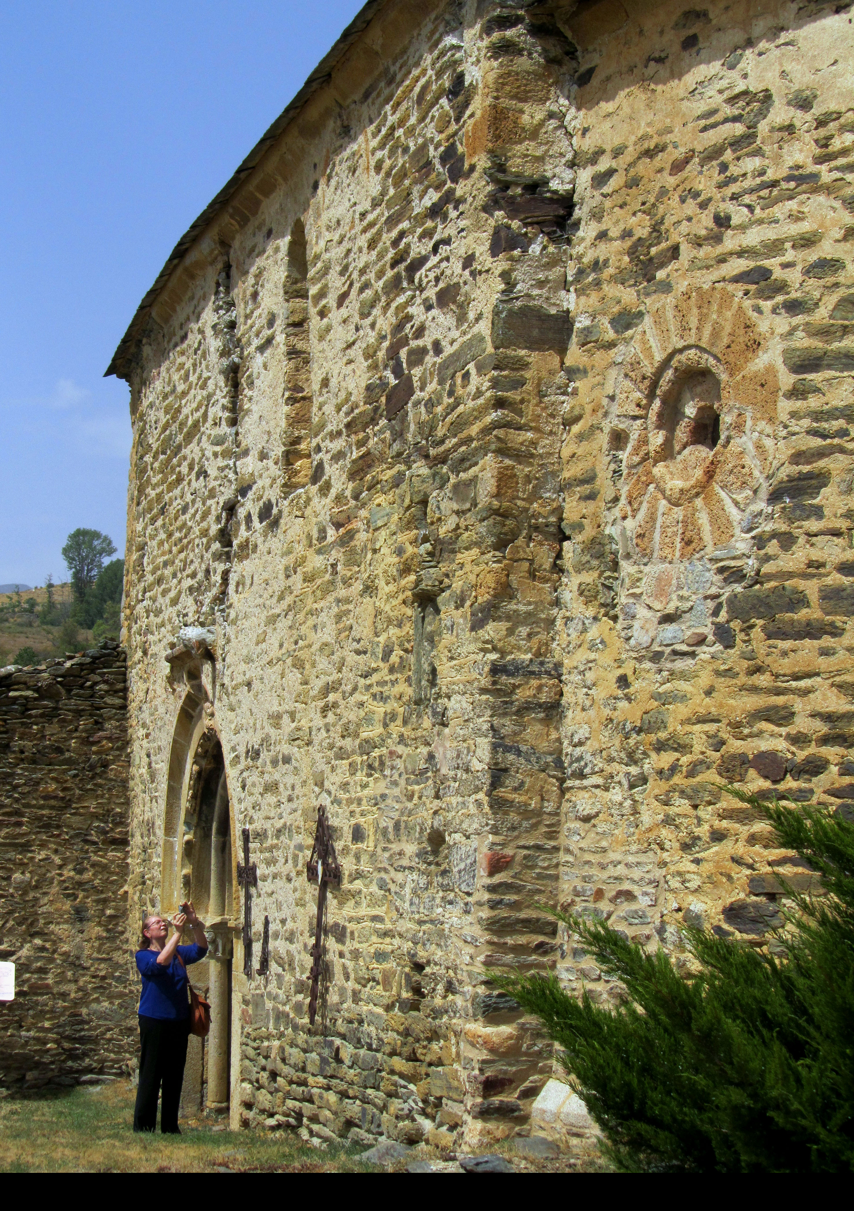 Iglesia de Santa Eugenia de Saga de estilo románica, en la Baixa Cerdanya Cataluña.